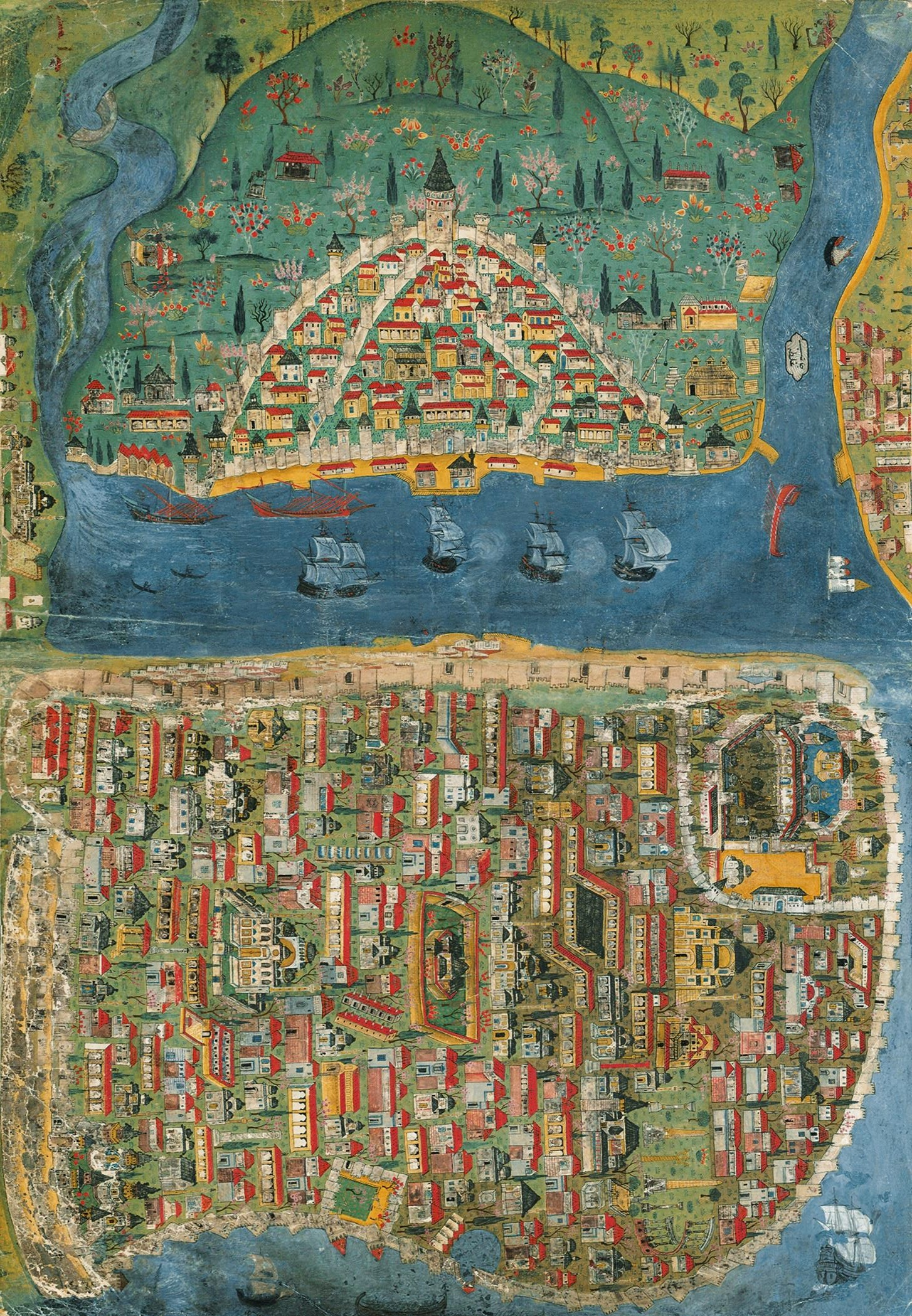 Matrakçı Nasuh'un İstanbul ve Galata betimlemesi